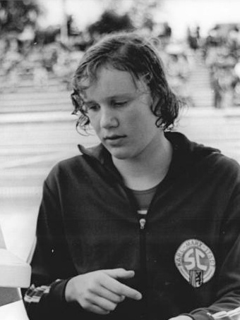 Ulrike Tauber ADN-ZB Koch 6-7-74-Rostock: XXV. DDR-Meisterschaften im Schwimmen (2.Tag)-Die 16jährige Ulrike Tauber (SC Karl-Marx-Stadt), hier beim Autogramme geben, holte sich über 400-m-Lagen in 4:57,76 min (DDR-Rekord,Altersklasse 9) den Meistertitel.